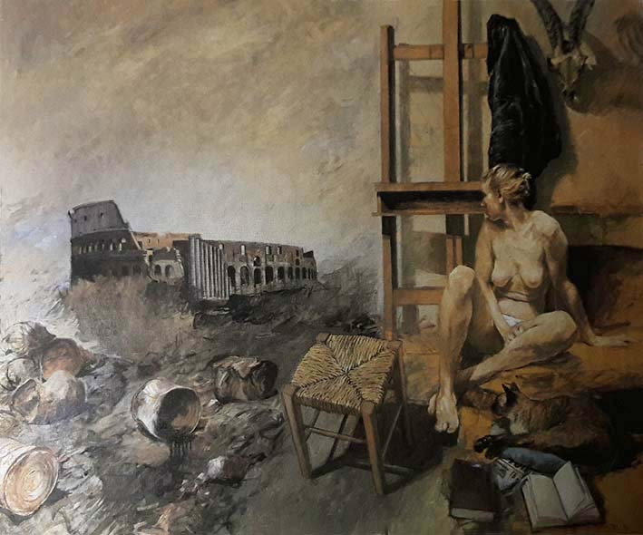 Melancholie in Rom, 1983, 152 x 180 cm, Öl auf Leinwand, Bez. u.r. “Timner 83”